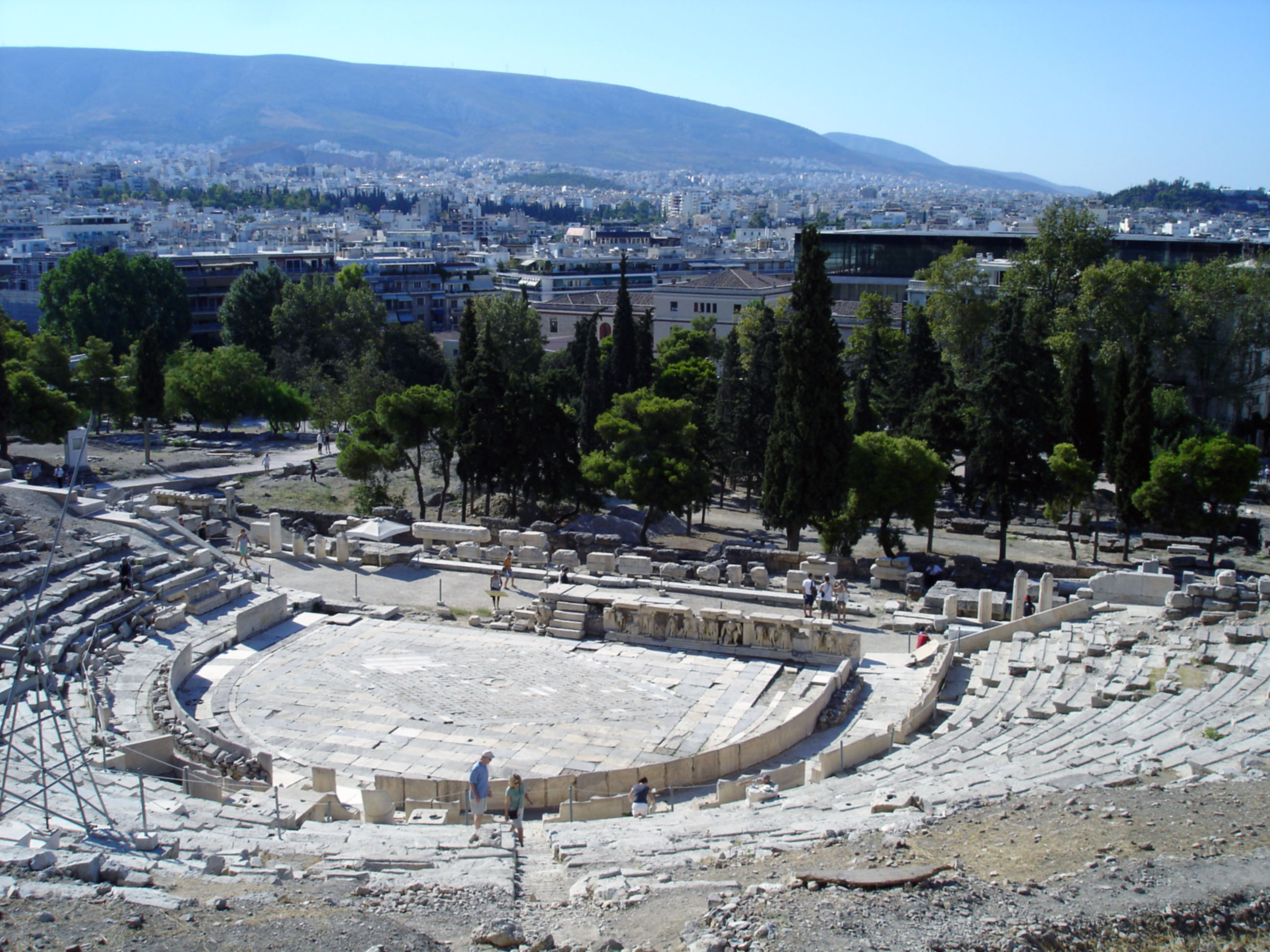 Аутор:Славен Косановић